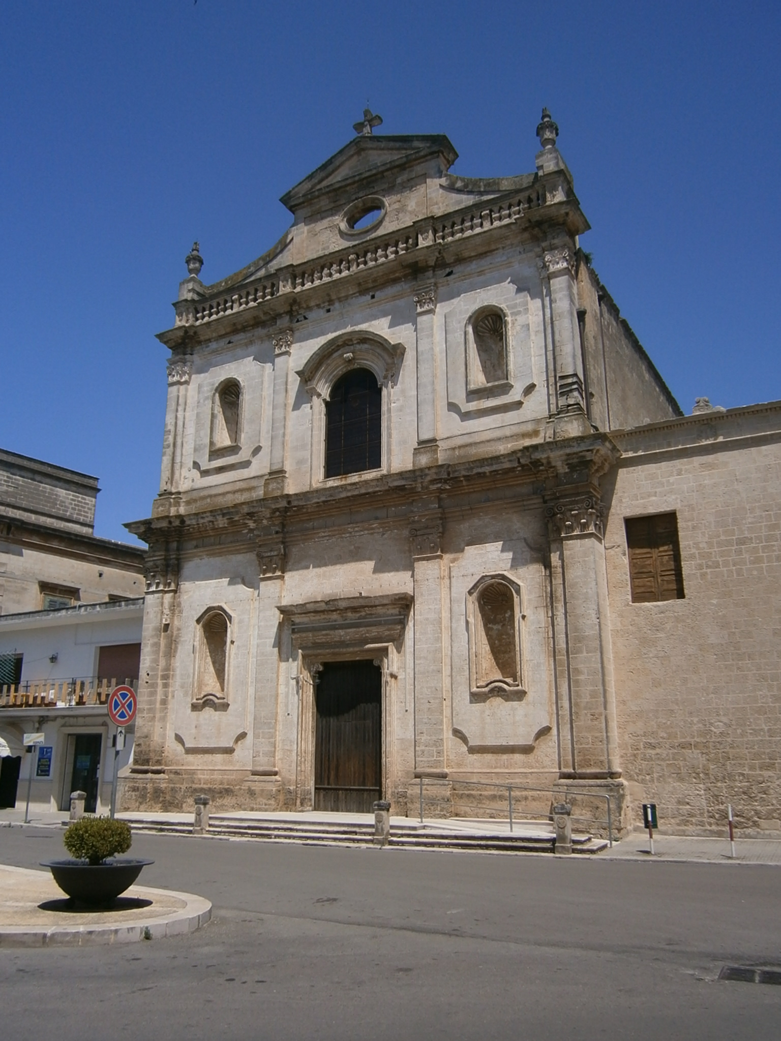 Manduria, la chiesa di San Francesco (d'Assisi).